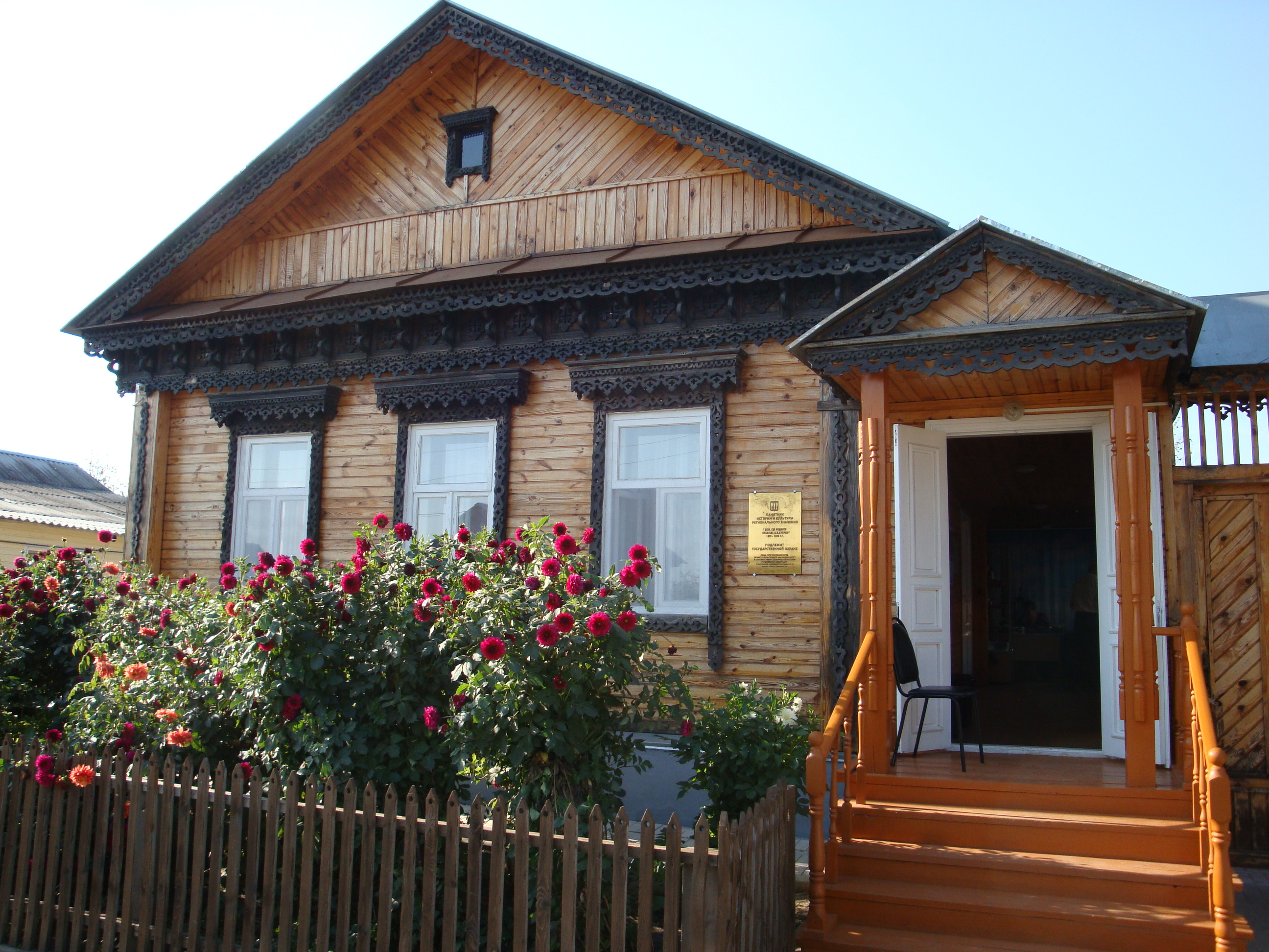 Дом, в котором жил литературовед и археограф В.И. Малышев на этом месте стоял дом, в котором родился и жил писатель А.И. Куприн: улица Куприна, 3, Наровчат, Наровчатский район, Пензенская область